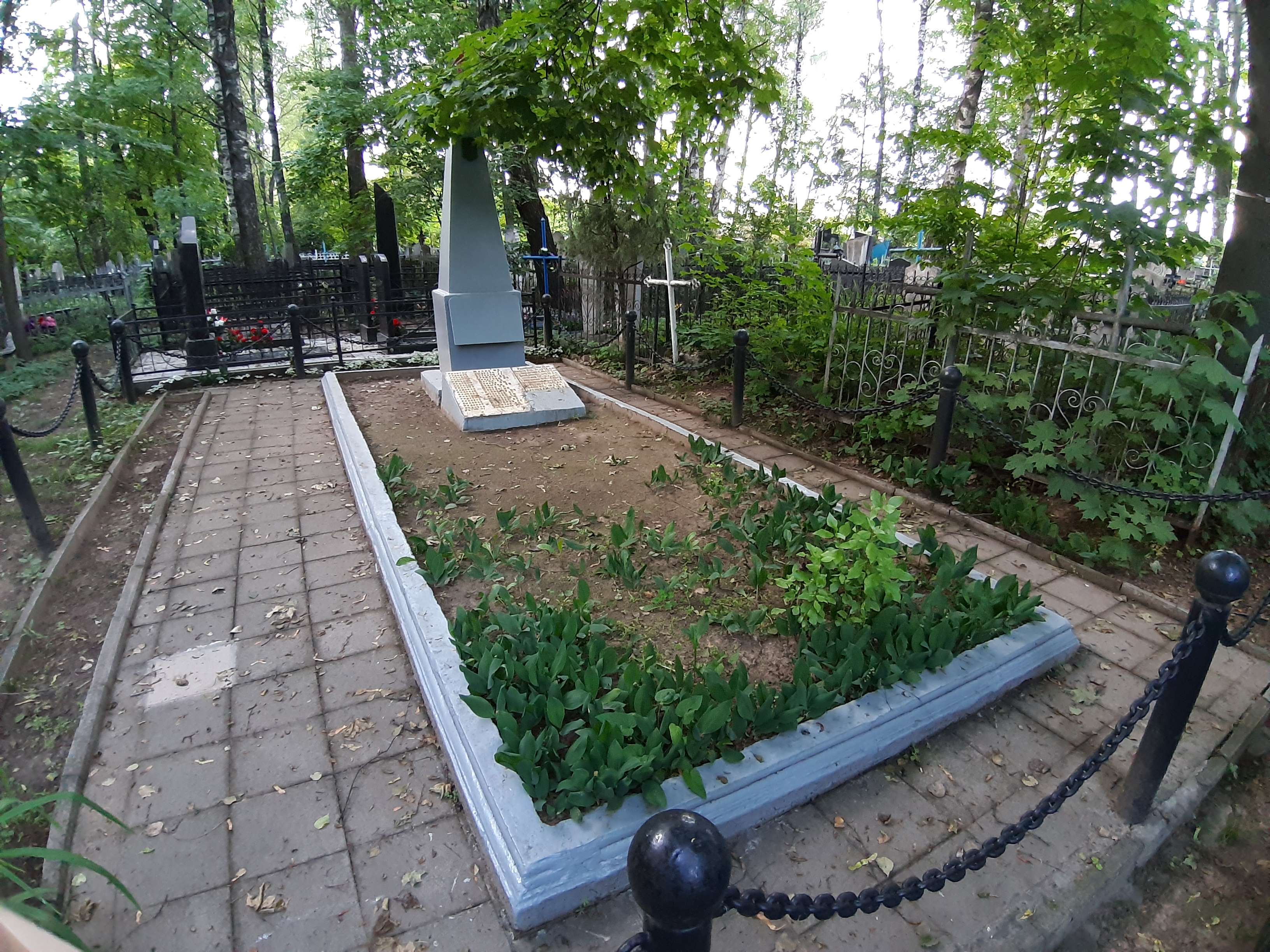 Магілёў. Машэкаўскія могілкі. Брацкія магілы